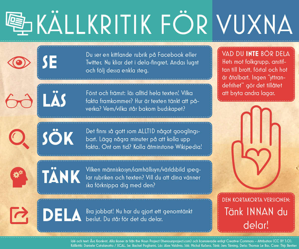 Poster on source criticism on the Internet - not only for children. A news article with the story behind the poster can be found at .